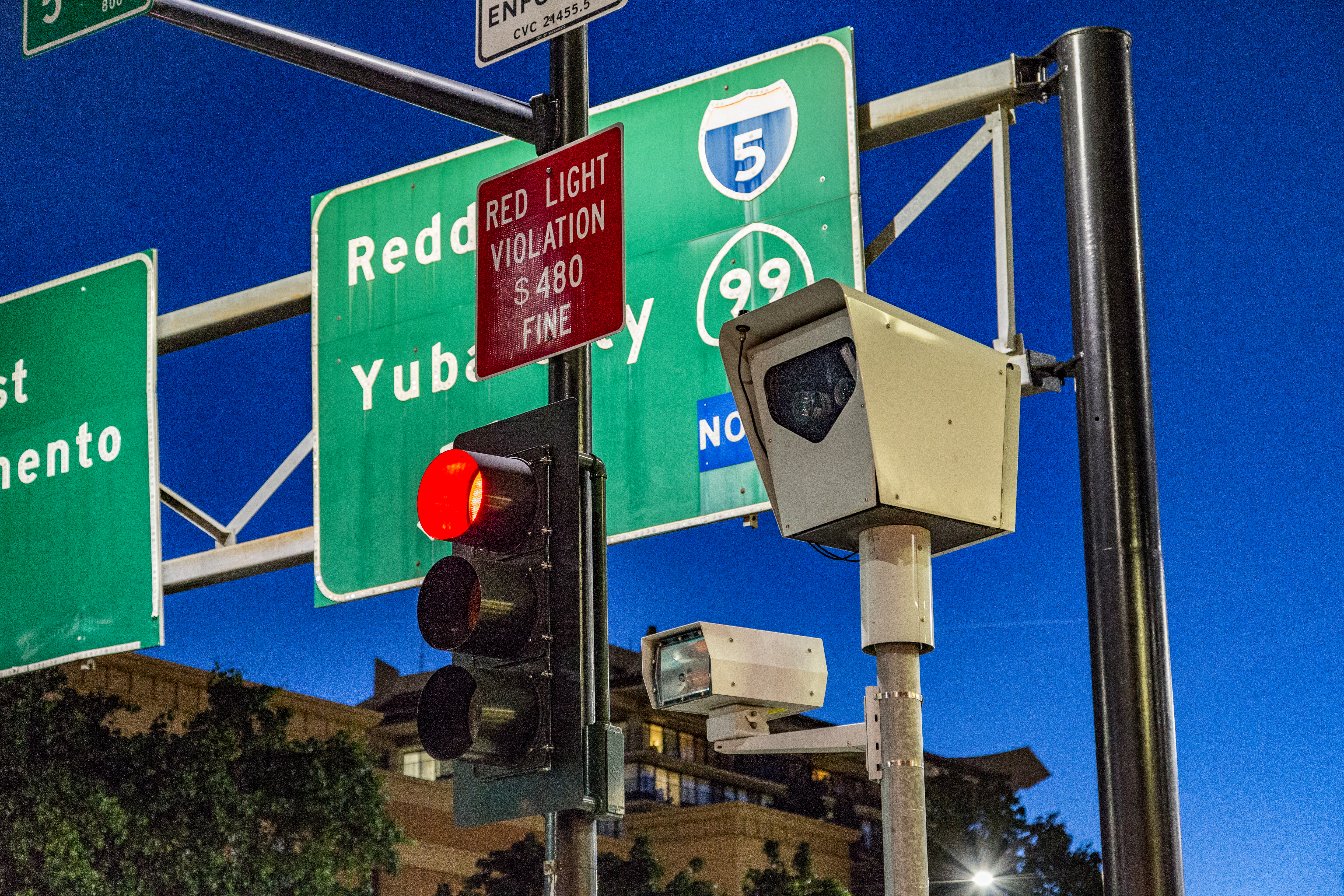 Sacramento, California